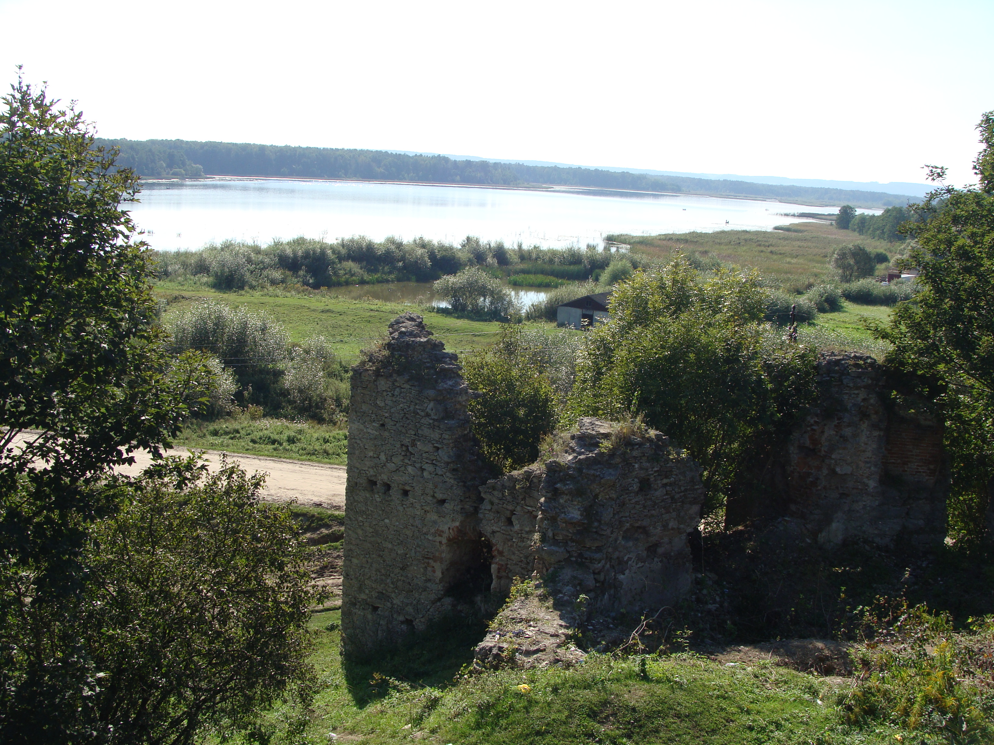 Novomalyn, Rivnens'ka oblast, Ukraine, 35843